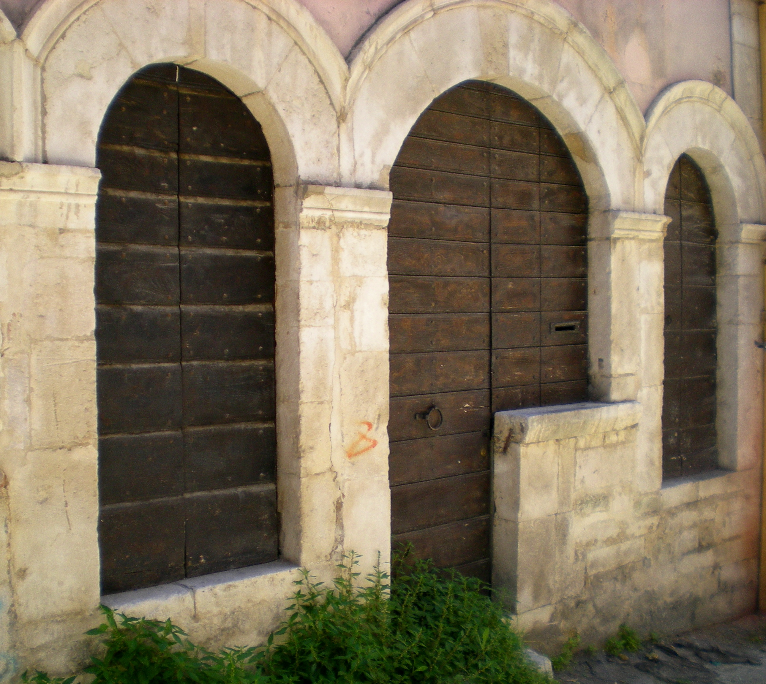 Le Cancelle, antiche botteghe medievali site in L'Aquila